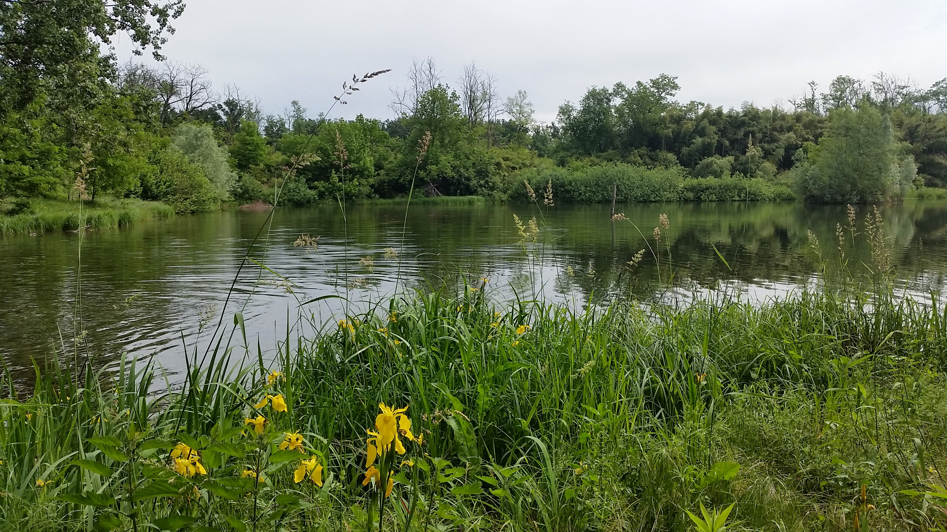 Oasi WWF Bosco di Vanzago, lago This is a photo of a monument which is part of cultural heritage of Italy. The authorisation for taking photos of this object was provided by the World Wide Fund for Nature Italy.